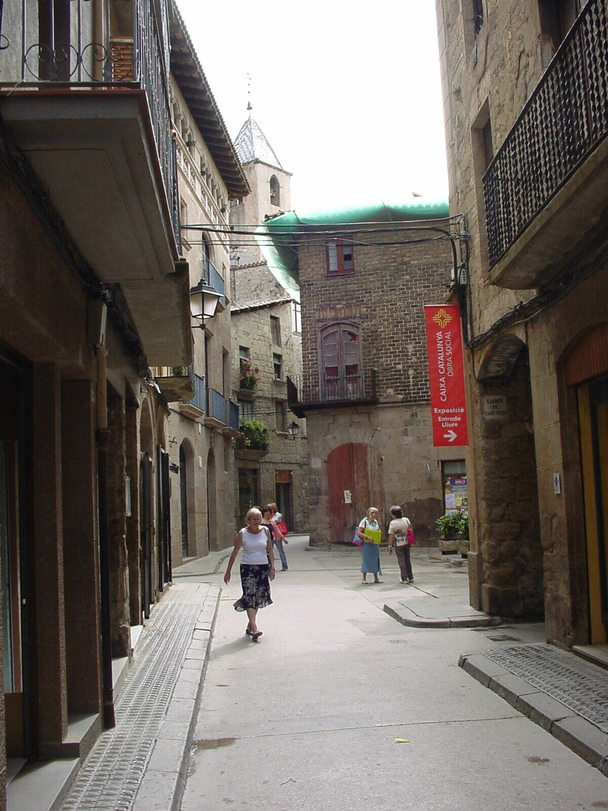 Cardona Ansicht